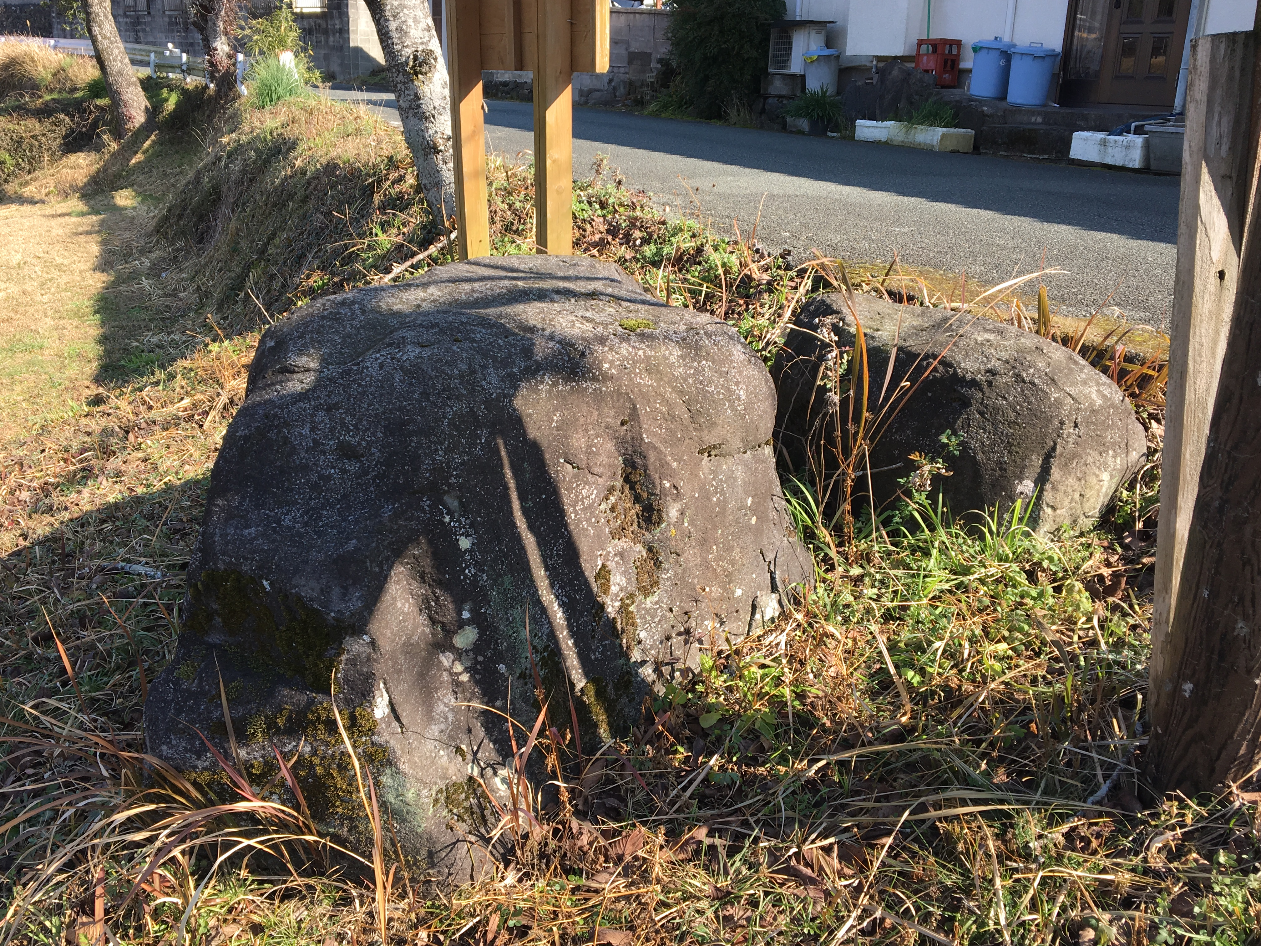 菊池さんのやすみ石